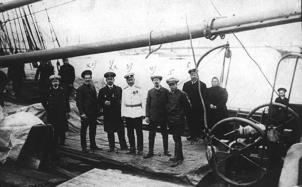 Руководитель экспедиции лейтенант Г.Я. Седов с членами команды принимает гостей — архангелогородцев, на борту экспедиционного судна «Святой мученик Фока». Архангельск. 1912 г. (фото из фондов музея Арктики и Антарктики)